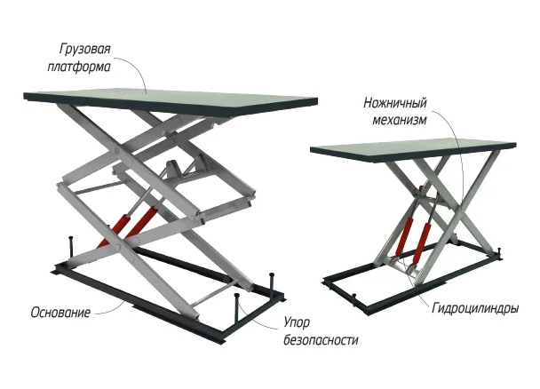 Конструкция ножничного подъемного стола и гидравлического ножничного подъемника.